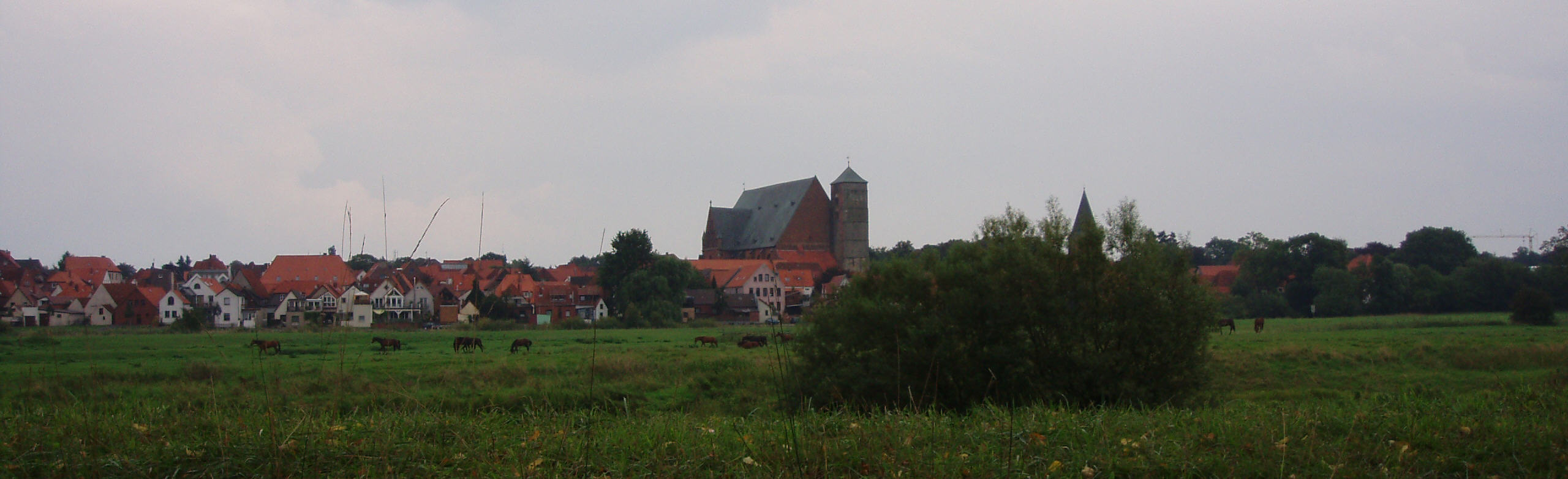 Verden an der Aller